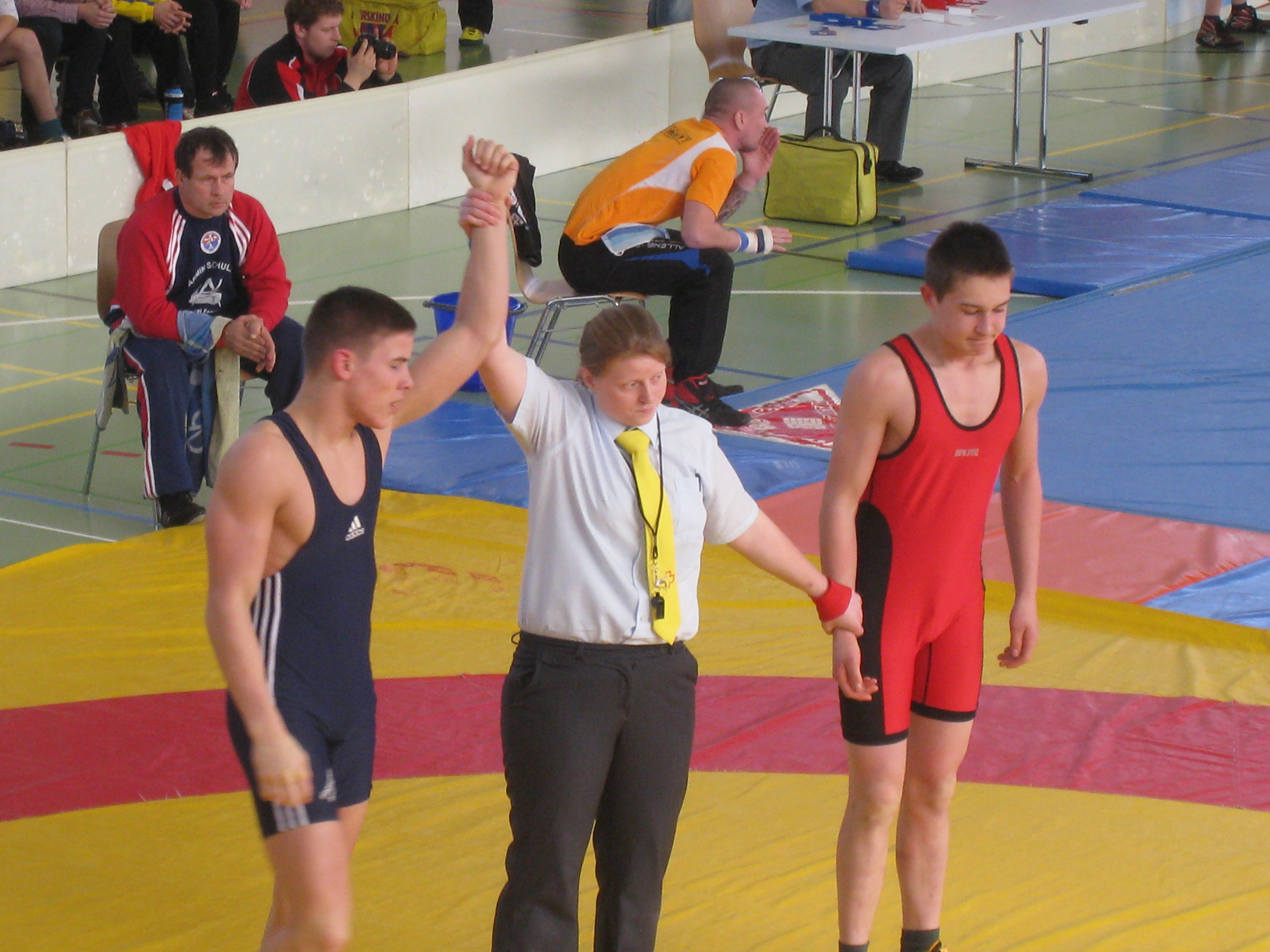 Ringen Jugend-Schweizermeisterschaft 2015